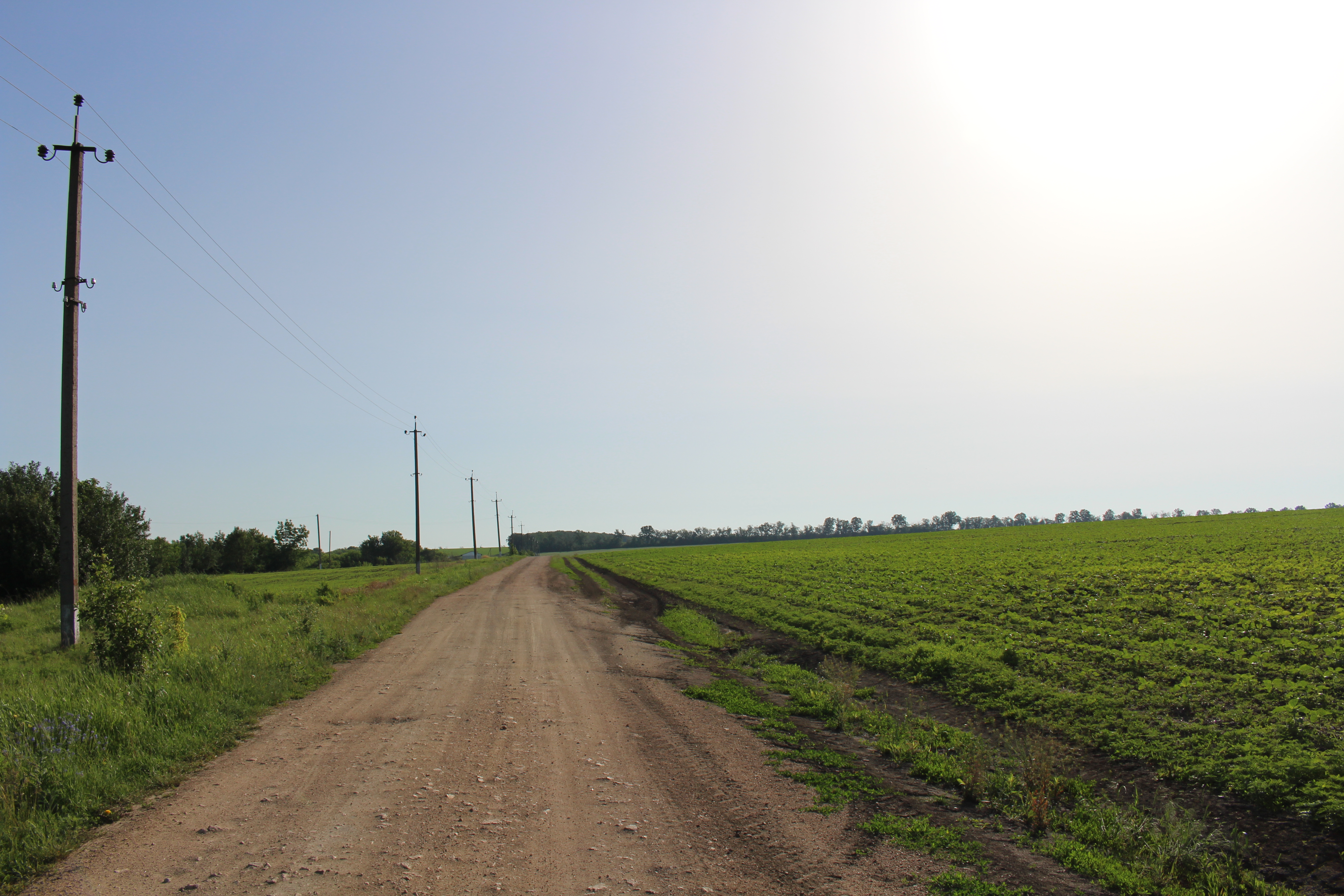 Зліва можна побачити ФГ "Межове"